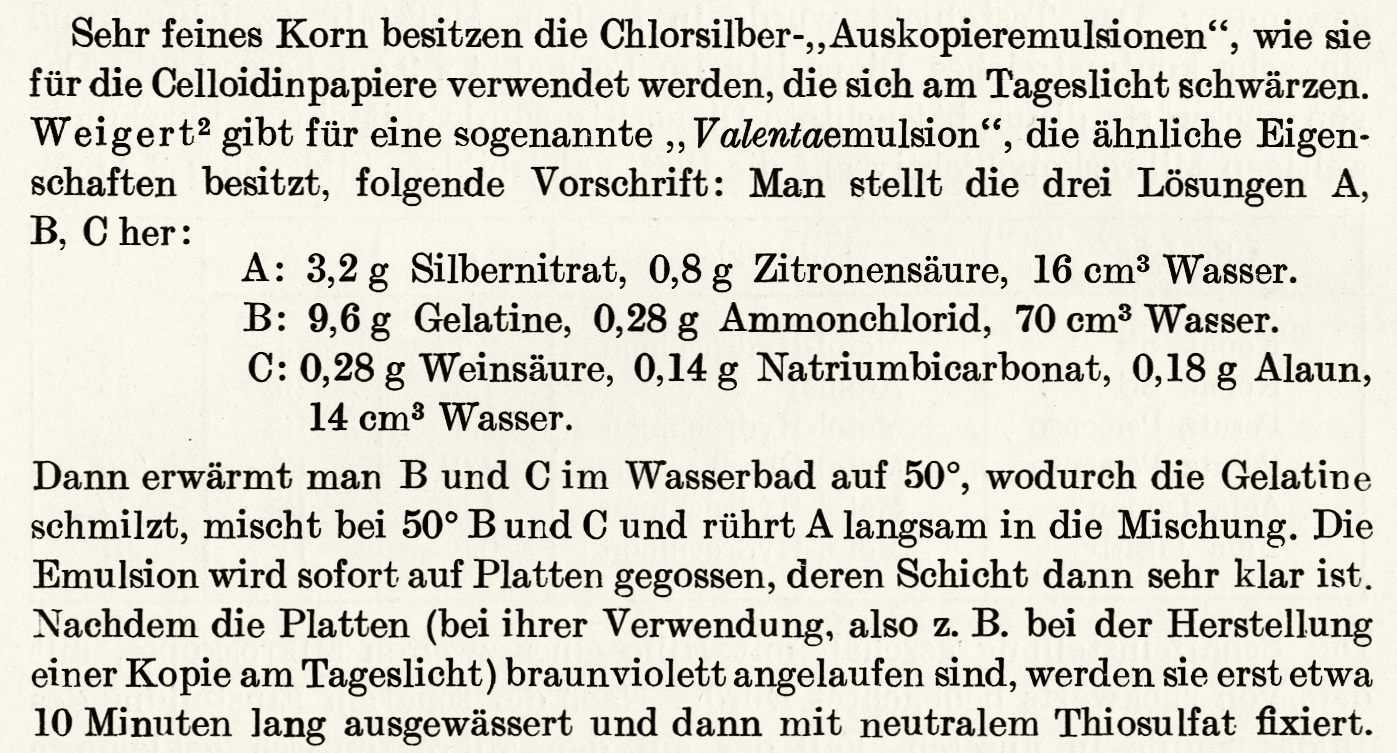 Historische Rezeptur und Herstellungsanweisung für eine Chlorsilber-Tageslicht-„Auskopieremulsion“ (sog. „Valentaemulsion“) zum Beschichten bzw. Herstellen von Celloidin-Papieren und Platten (beschrieben in: Weigert, F., Ann. Physik 63, 1920)